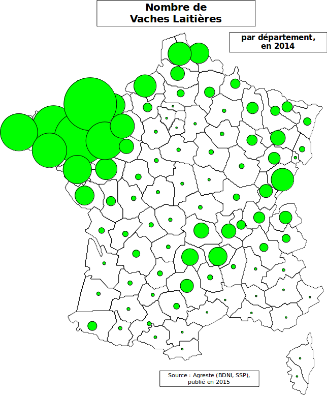 Source : Agreste (d'après données Identification Bovines, SSP)